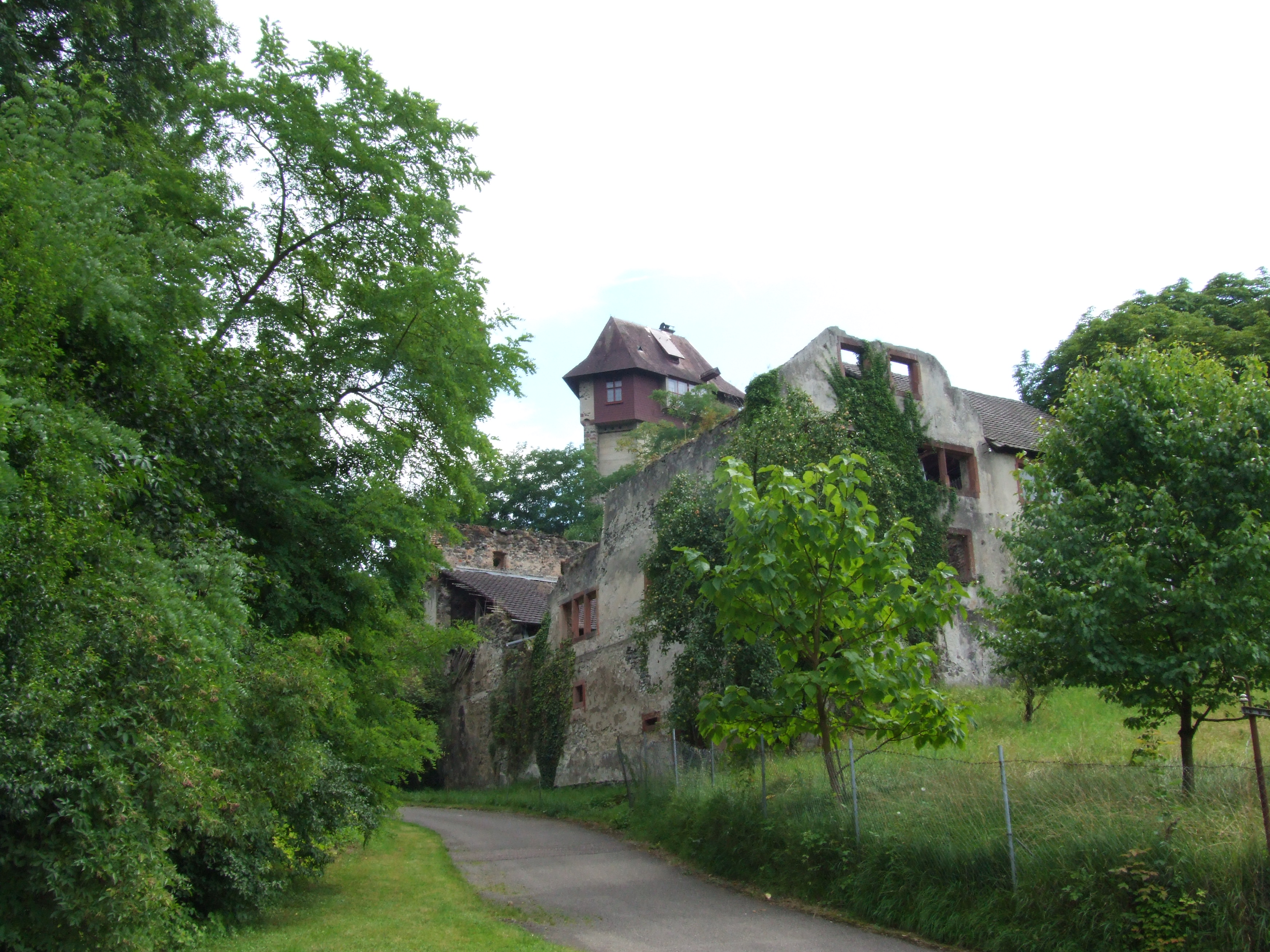 Die heutige Burg Sponeck bei Sasbach-Jechtingen